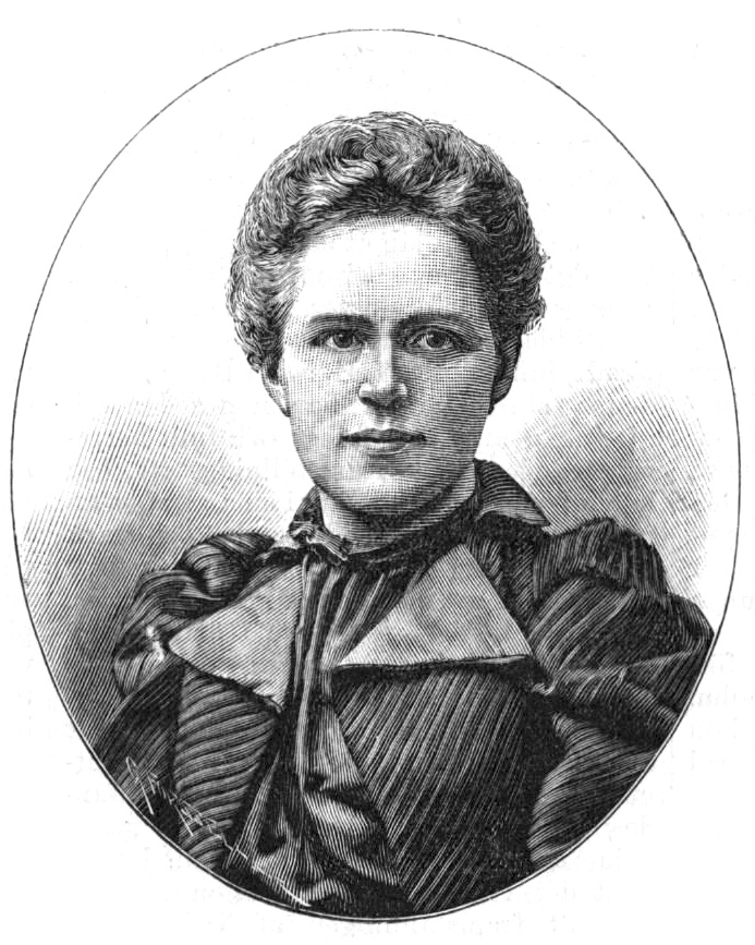 Jane Gernandt-Claine (1862-1944)